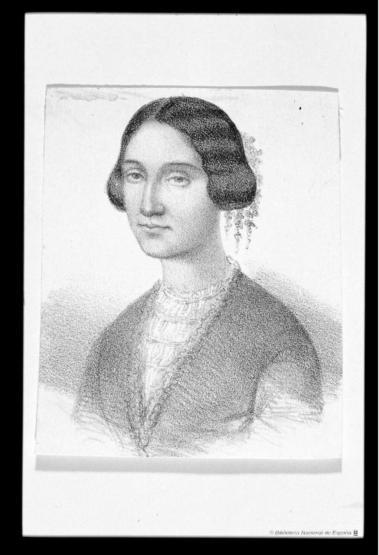 Retrato de Dolores Cabrera Heredia, litografía obra de Leopoldo López de Gonzalo. Establecimiento litográfico de Peant (Madrid). Biblioteca Nacional de España.